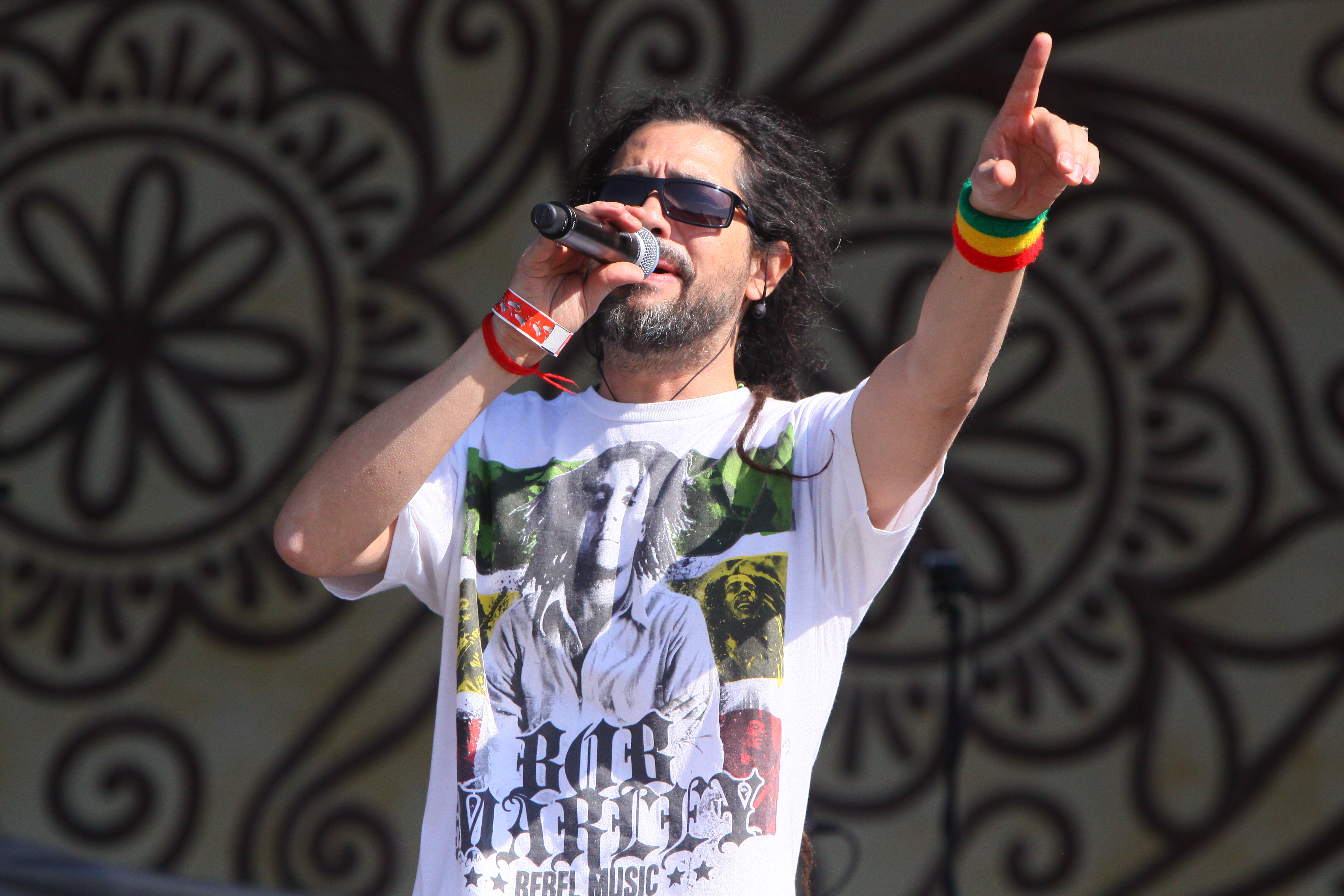 IMG_8530 Quique Neira en Lollapalooza Chile 2011.